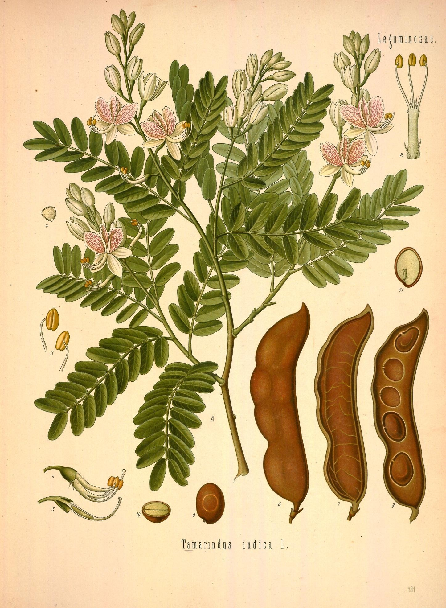 Tamarindenbaum. A blühender Zweig, natürl. Grösse; 1 Blüthe ohne Kelchblätter, vergrössert; 2 Staubgefässplatte mit den fruchtbaren und verkümmerten Staubgefässen und den verkümmerten Kronenblättern, desgl.; 3 Staubgefäss, desgl.; 4 Pollen, desgl.; 5 Stempel, desgl.; 6 reife Frucht, natürl. Grösse; 7 dieselbe von der Rinde befreit, mit blosgelegten Gefässbündeln, desgl.; 8 dieselbe im Längsschnitt, um die Samenfächer zu zeigen, desgl.; 9 Same, desgl.; 10, 11 derselbe im Längs- und Querschnitt, desgl.